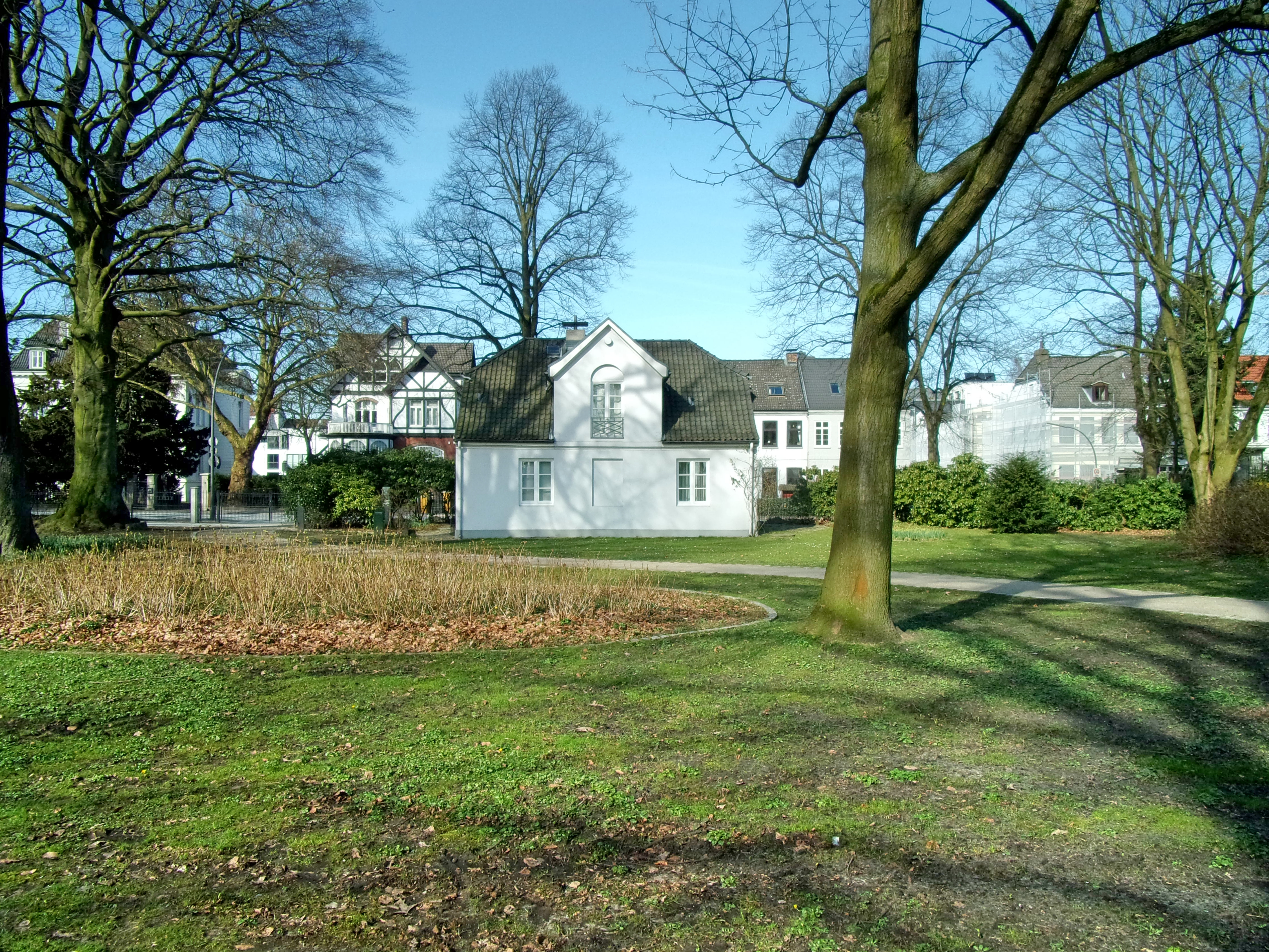 Zum denkmalgeschützten Ensembles des Heine-Parks an der Elbchaussee gehört neben der Plangeschen Villa und dem Wohnhaus auch das ehemalige Gartenhaus, Elbchaussee 31. Erbaut ca 1832 und heutige Außenstelle des Altonaer Museums. Das Gebäude befindet sich direkt am Parkeingang der Elbchaussee. This is a photograph of an architectural monument.